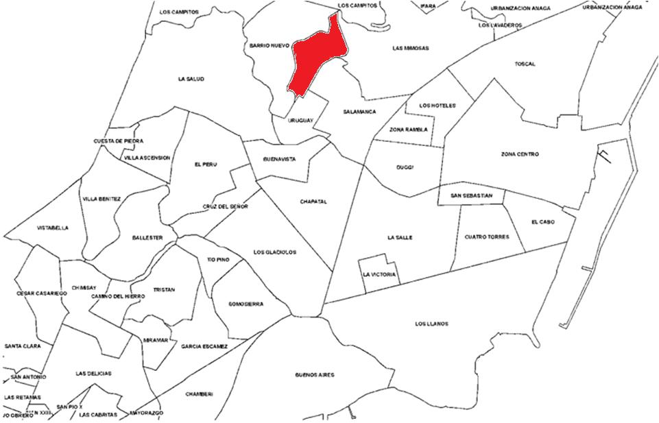 Localización del barrio.